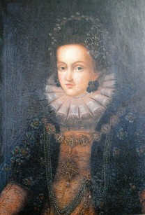 Anna Marie Bádenská